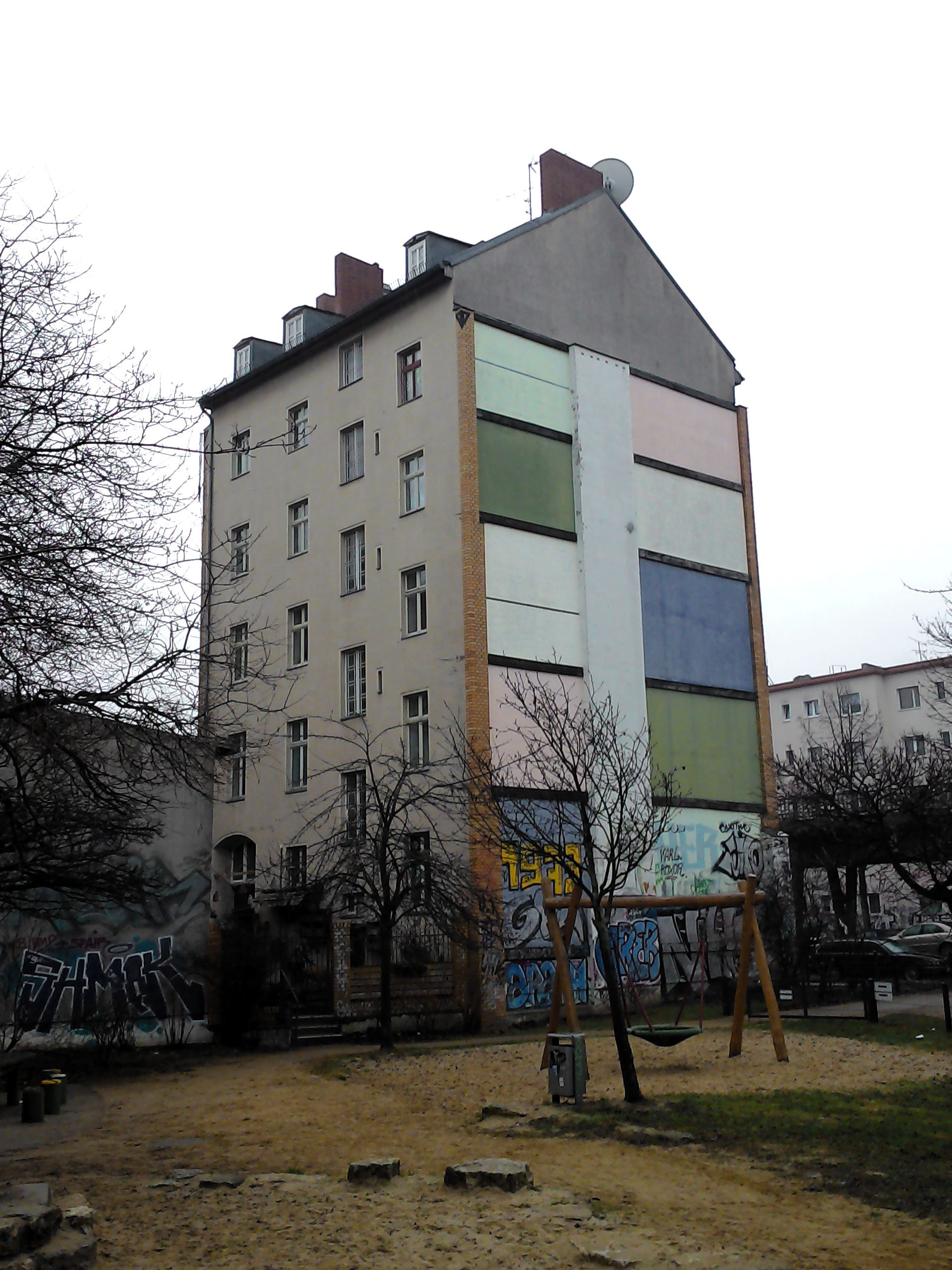 Der Block 104 bezeichnet in Berlin-Kreuzberg den von Oranien-, Skalitzer und Mariannenstraße umgrenzten Häuserblock, dessen Totalabriss im Frühjahr 1981 durch die Besetzung eines bereits entmieteten Eckhauses gestoppt wurde. Zu diesem Stopp hatte auch der Privatbesitzer des Gebäudes Skalitzer Str. 114 beigetragen, der sich geweigert hatte, sein Haus zum Abriss zu verkaufen. Auf der Fläche des Teilabrisses befindet sich heute ein Park. Der Block 104 ist das Symbol für das Ende der Flächensanierung in Berlin.